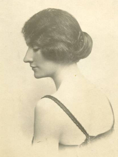 Princesa Maria Bona de Saboia